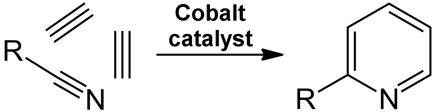 Bönnemann-Cyclisierung